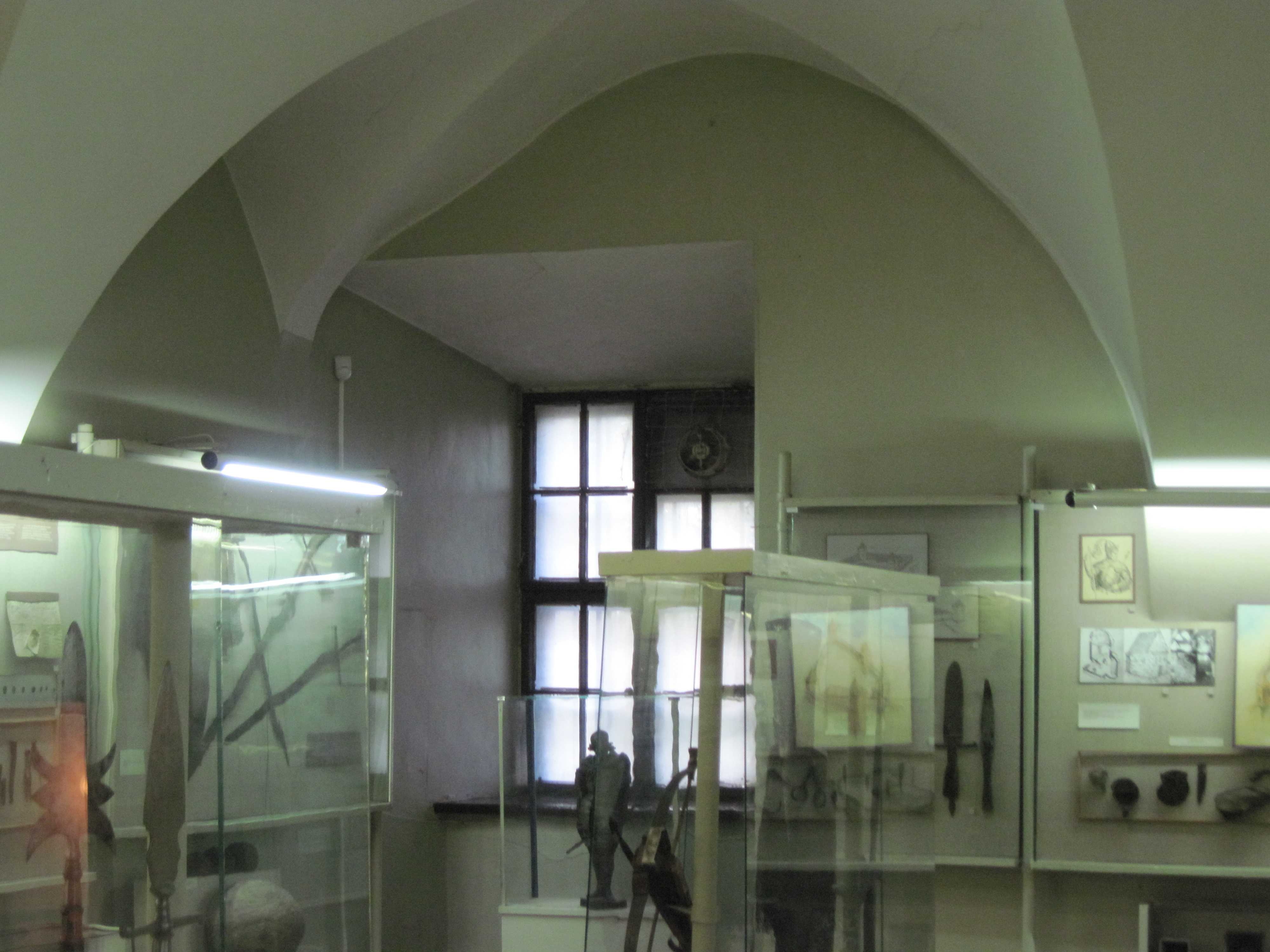 Стары замак у Гродне. Першы паверх